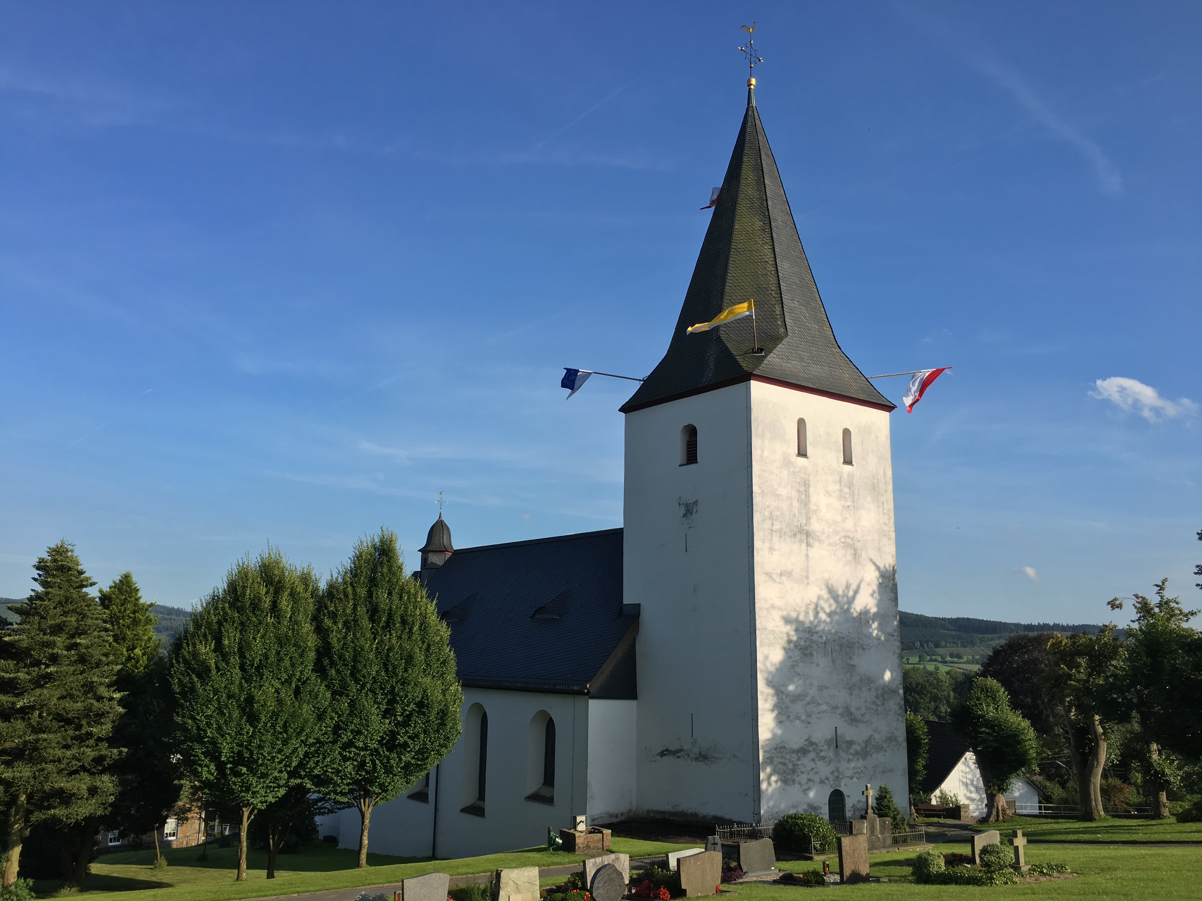 Kirche Schönholthausen, Ansicht aus Norden